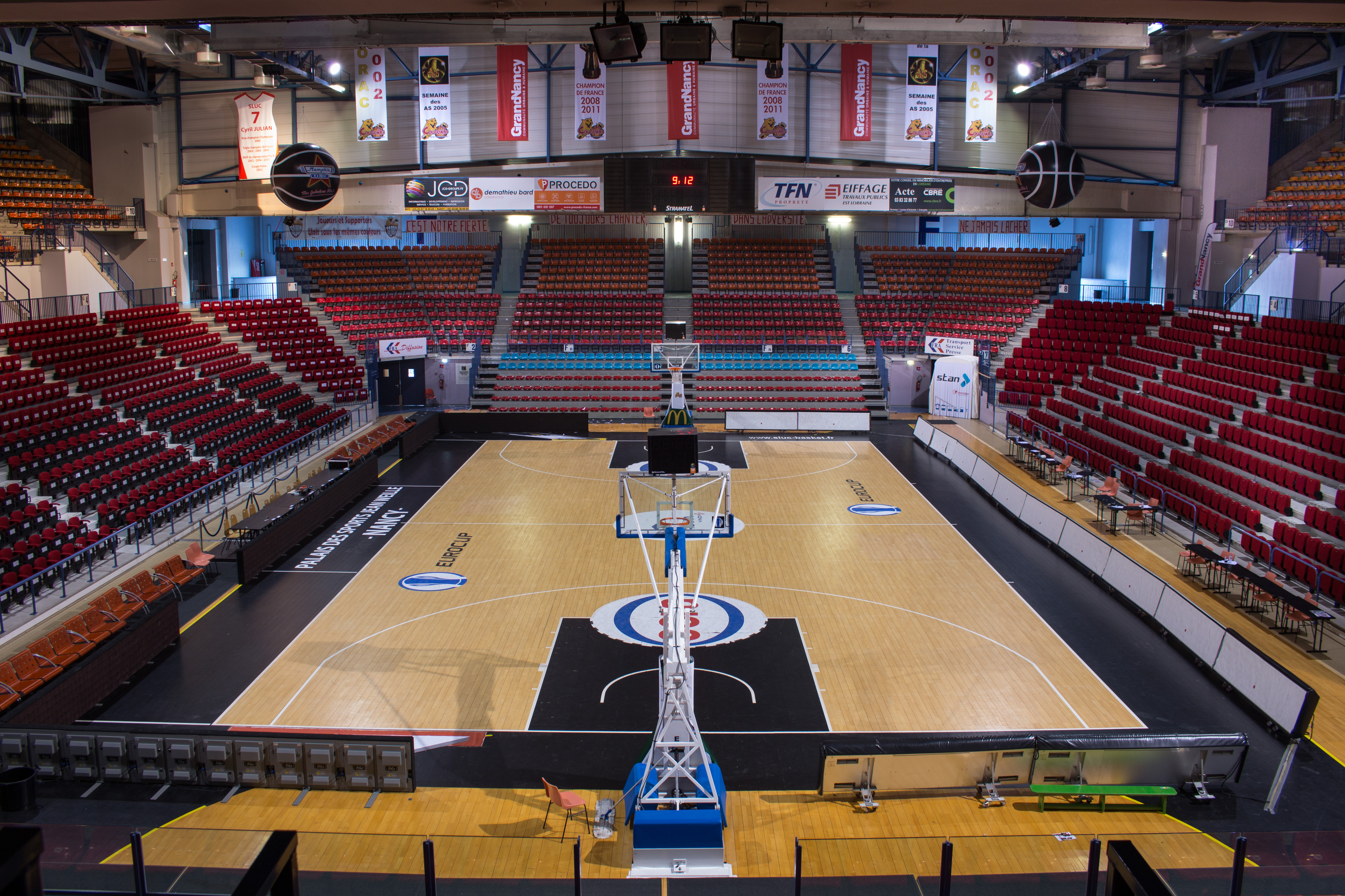 Palais des Sports de Gentilly